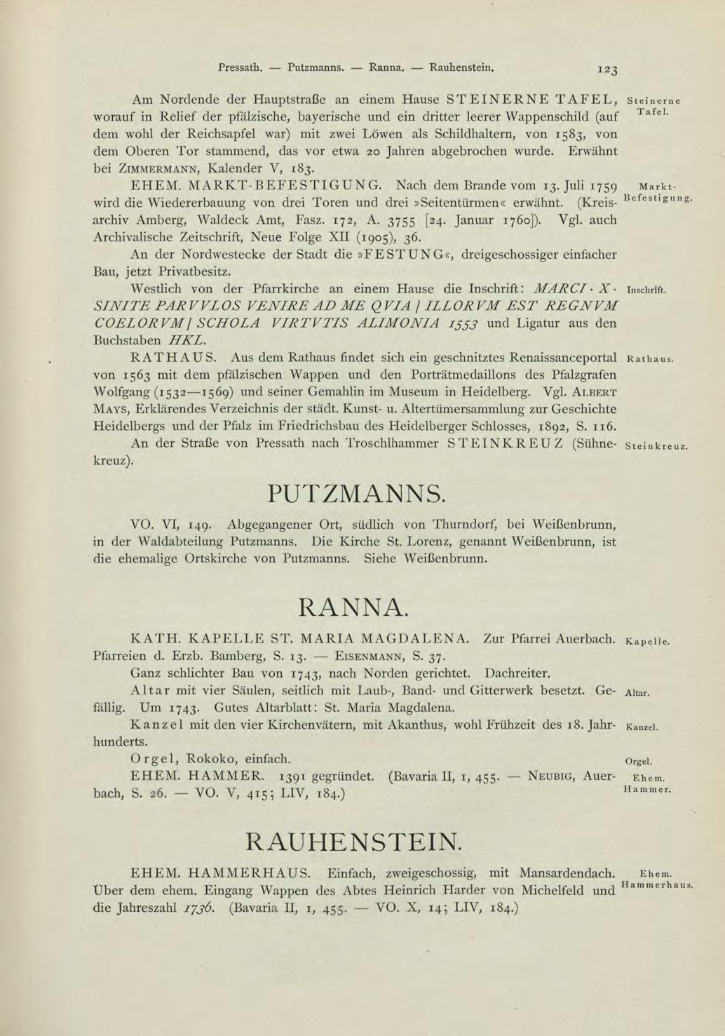 Die Kunstdenkmäler des Königreichs Bayern - Bezirksamt Eschenbach